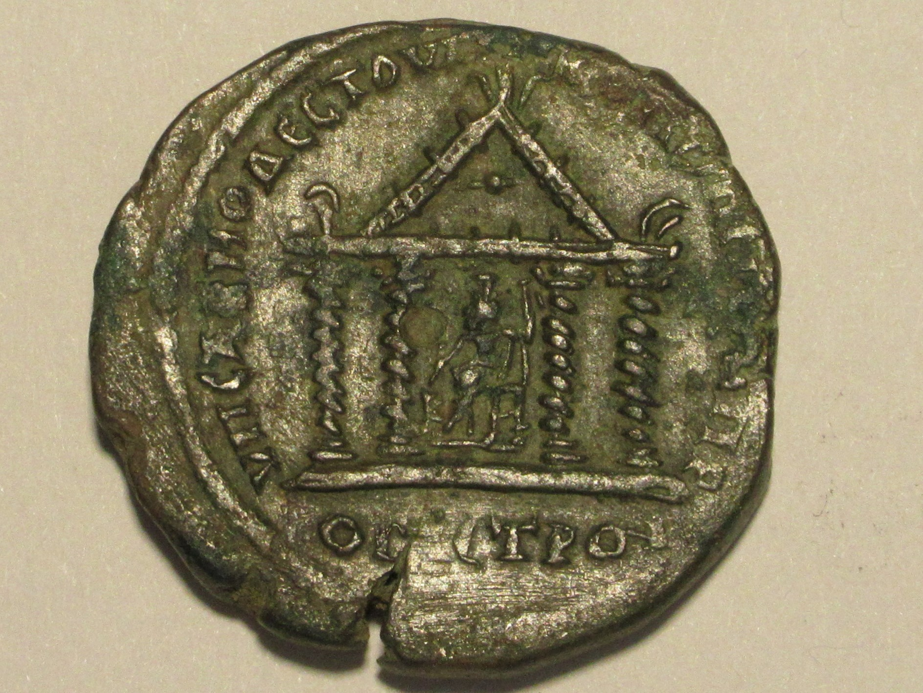 Serapistempel in Marcianopolis auf Bronzemünze z.Zt. Gordian III., Varbanov, GIC 4228